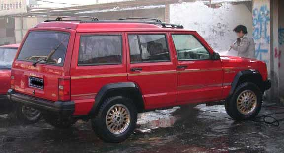 Beijing BJ2021 Jeep Cherokee 4WD. Note raised roof.